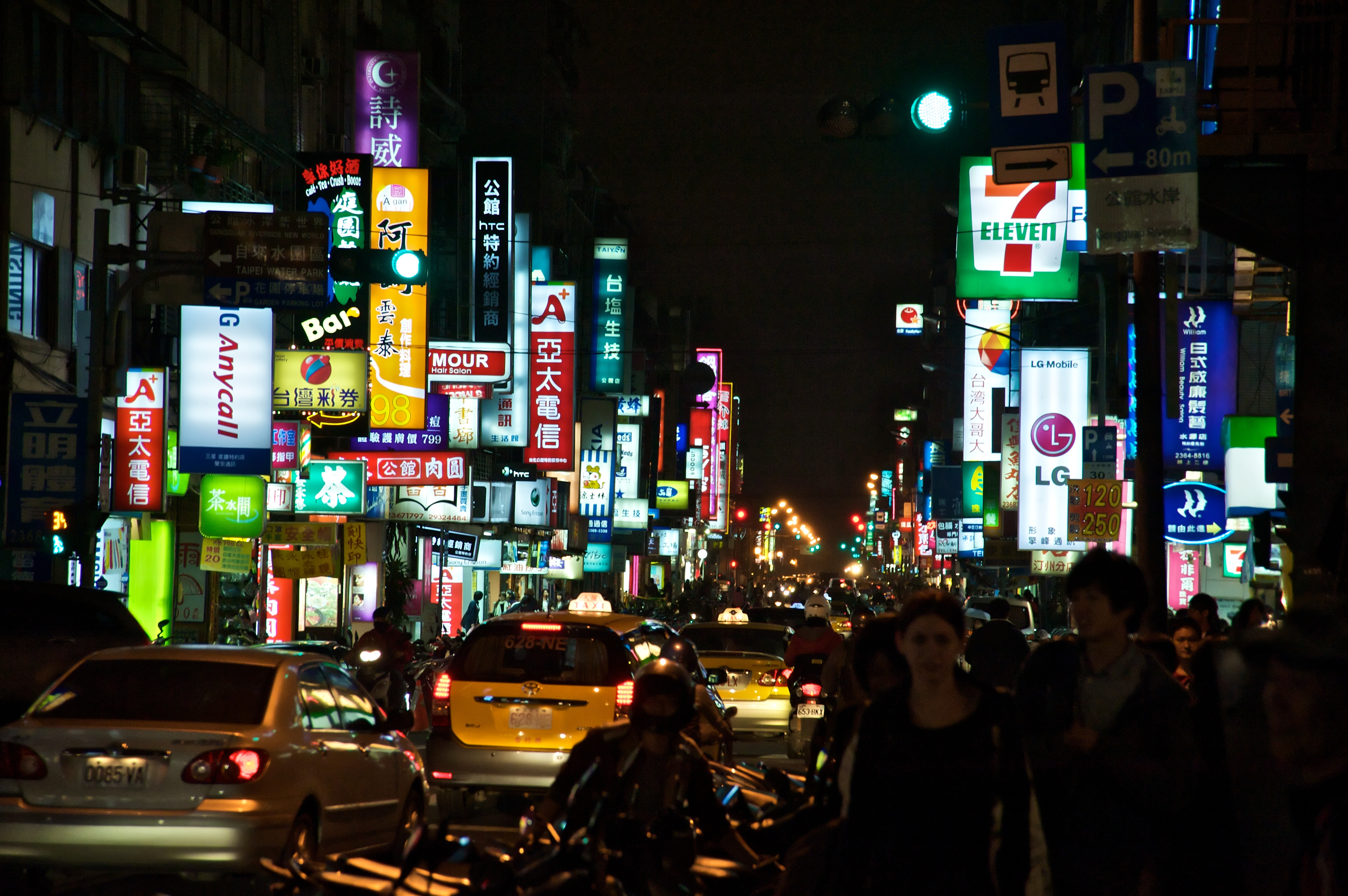 臺北市公館汀州路夜景。